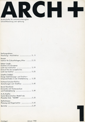 Cover der Architekturzeitschrift Arch+ 1